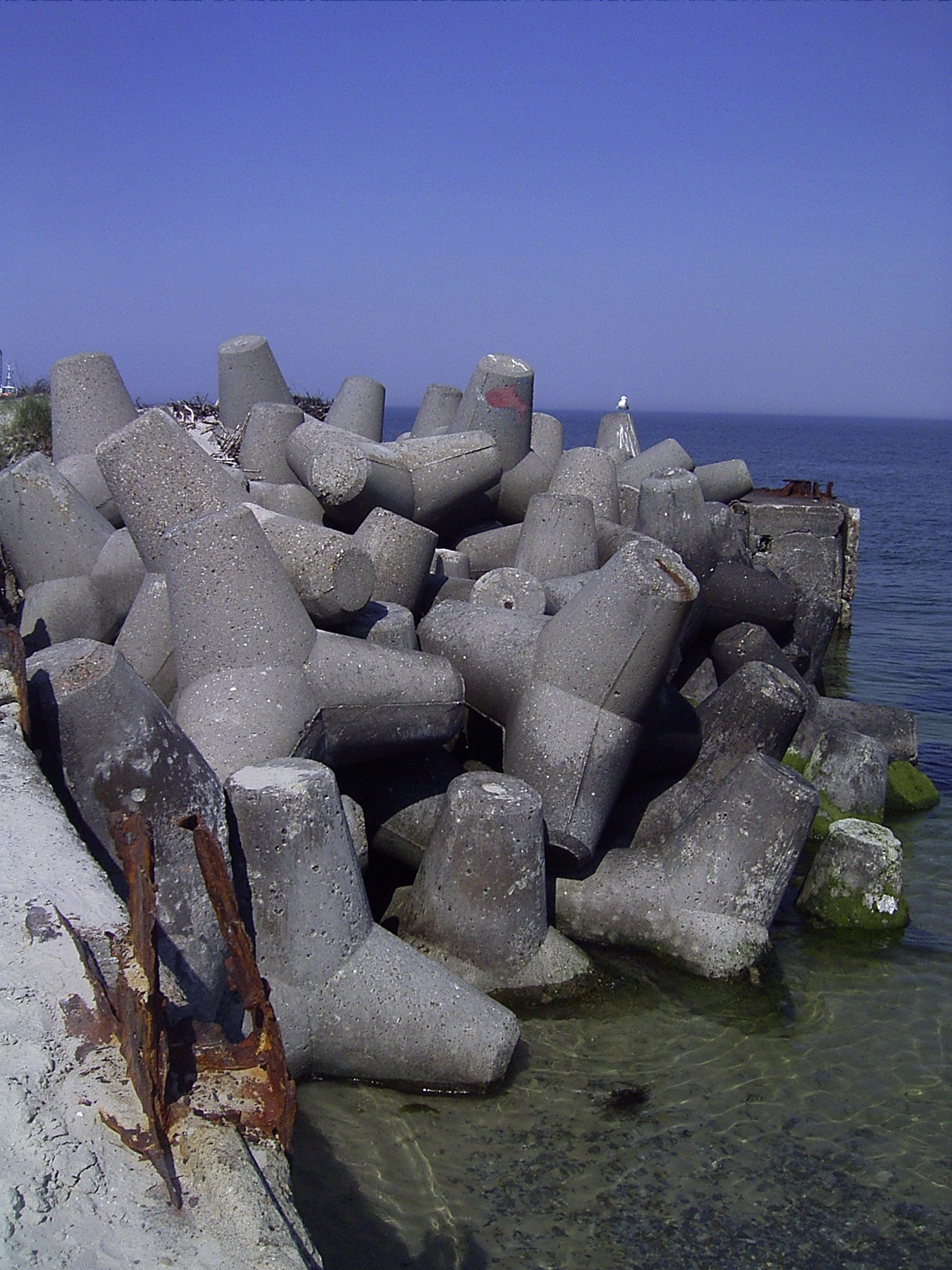 Helgoland, Düne, Beton-Tetrapoden